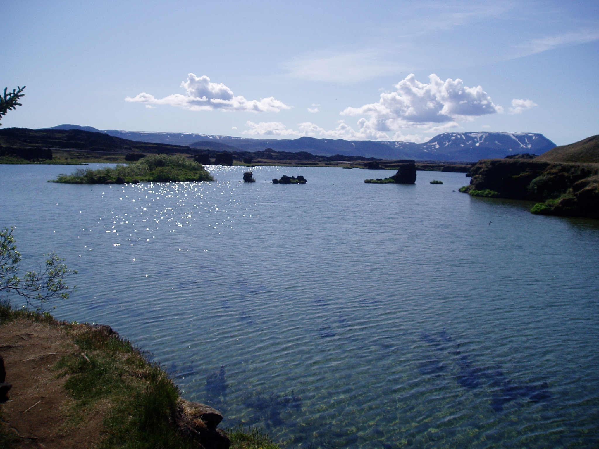 Le lac Myvatn en Islande